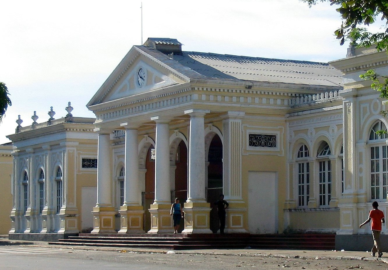 Fachada da Estação Ferroviária de Fortaleza João Felipe